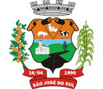 Coat of arms of São José do Sul, Rio Grande do Sul, Brazil.